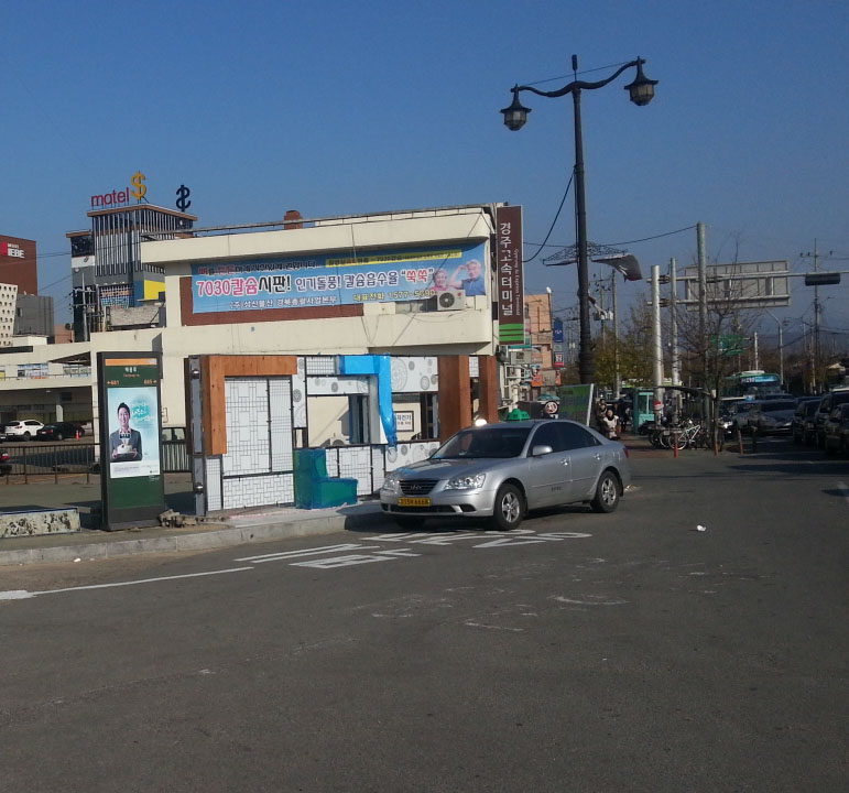 경주고속버스터미널 뒷편 모습